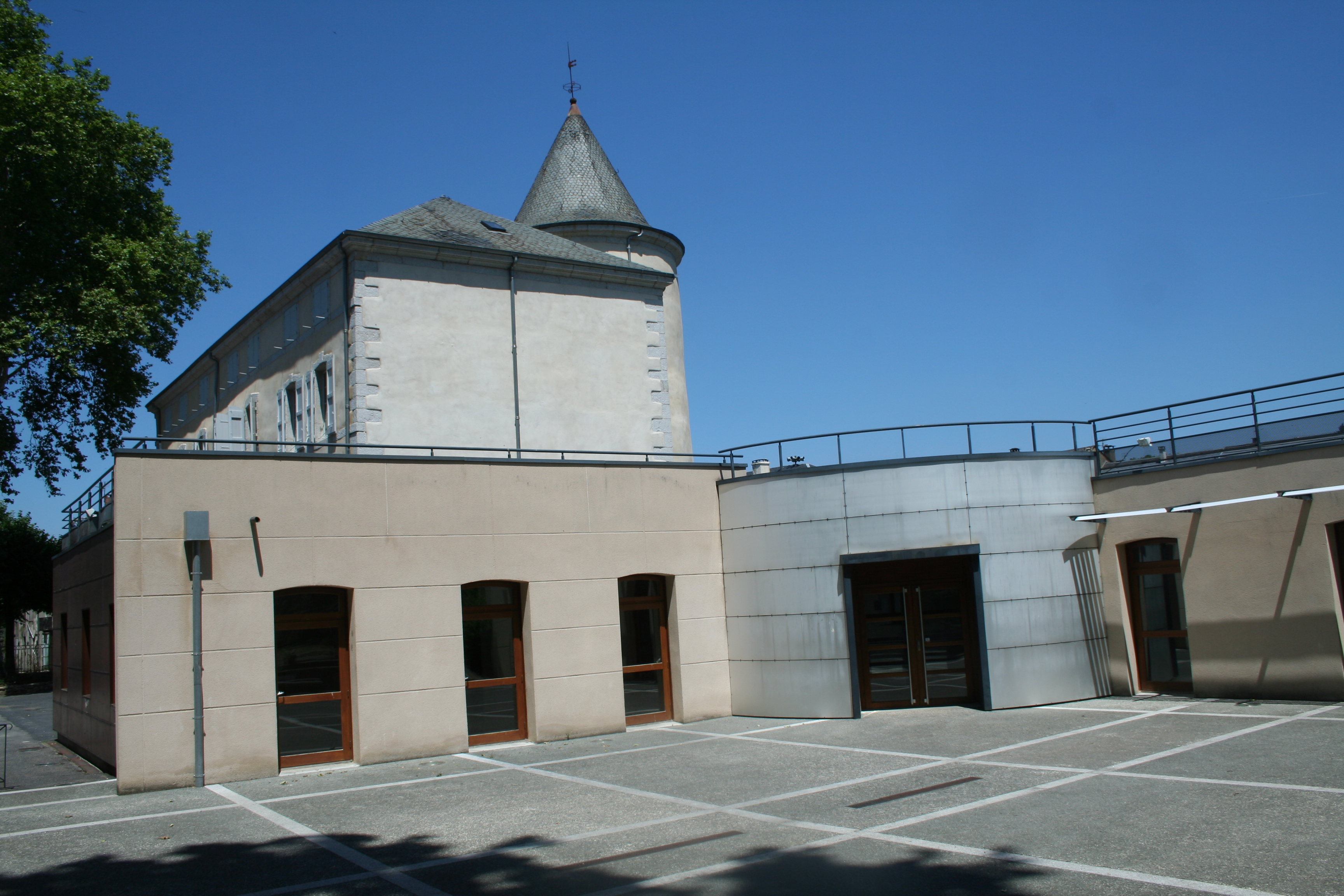 Brassac (Tarn) - ludothèque.